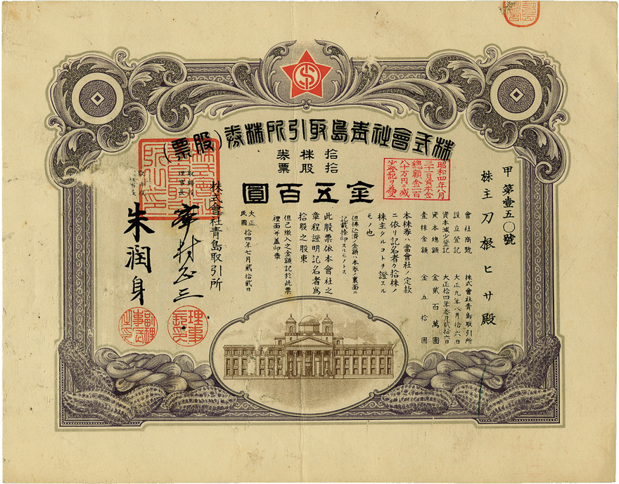 青岛取引所股票